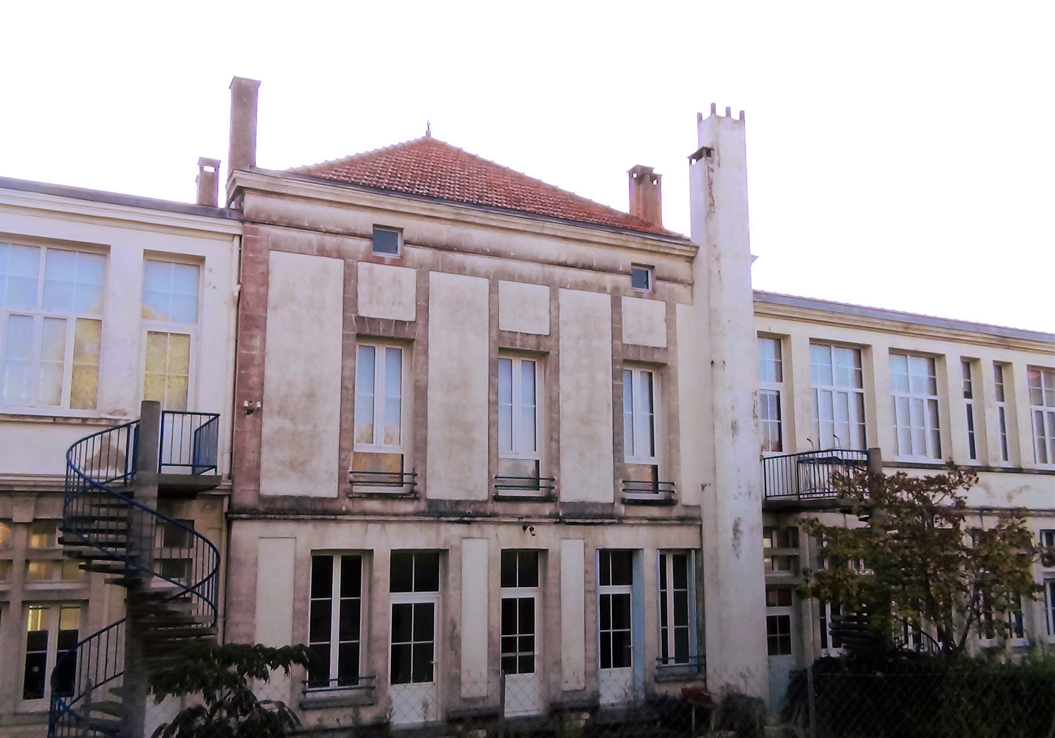 Bâtiment principal école maternelle Jules Ferry